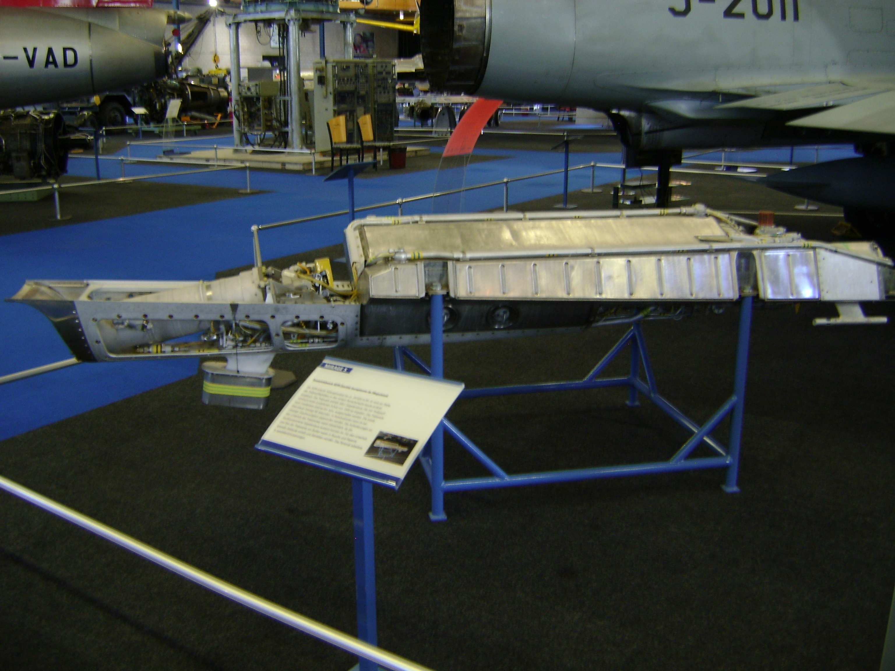 SEPR Antrieb für Mirage